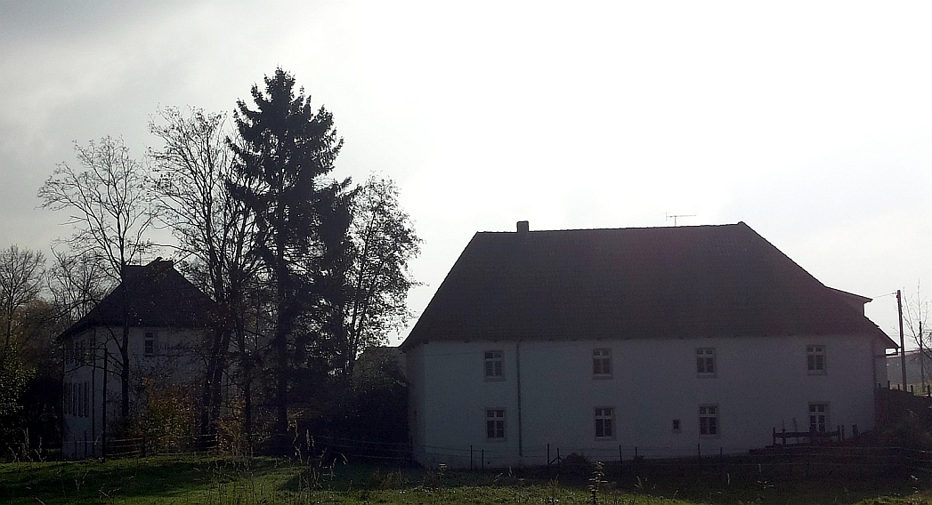 Haus Altendorf in Fröndenberg-Altendorf (Germany)